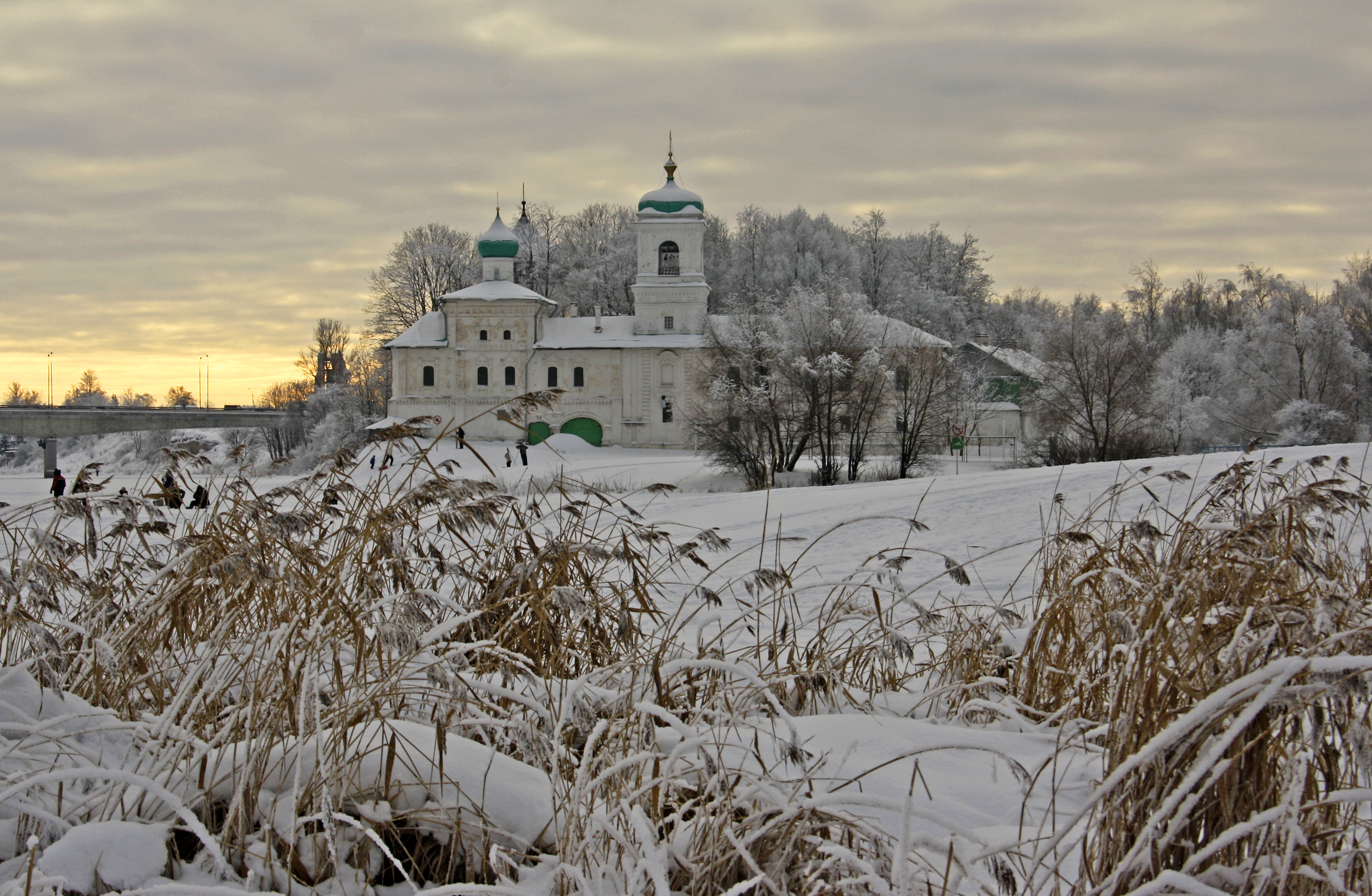 Колокольня (1879 г.), увенчанная куполообразной кровлей, примыкает к Святым воротам; к ней, в свою очередь, присоединяется двухэтажный Братский корпус, образуя парадный фасад монастыря с северной стороны. Стефановская церковь представляет собой надвратный трапезный храм на подклете, к которому примыкают Святые ворота.